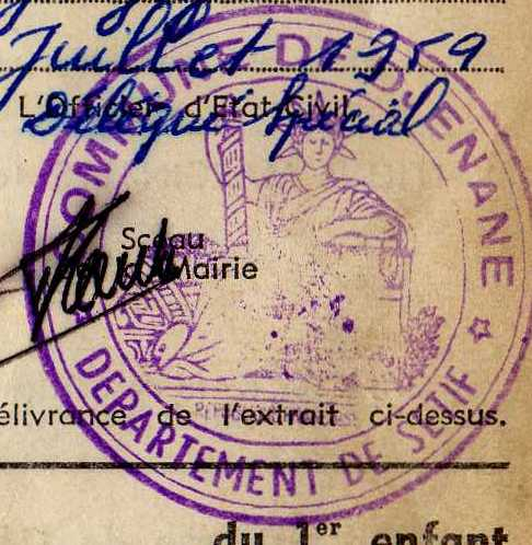 la commune de Djenane pendant l’Algérie française appartenant au departement de SETIF (1848-1962)